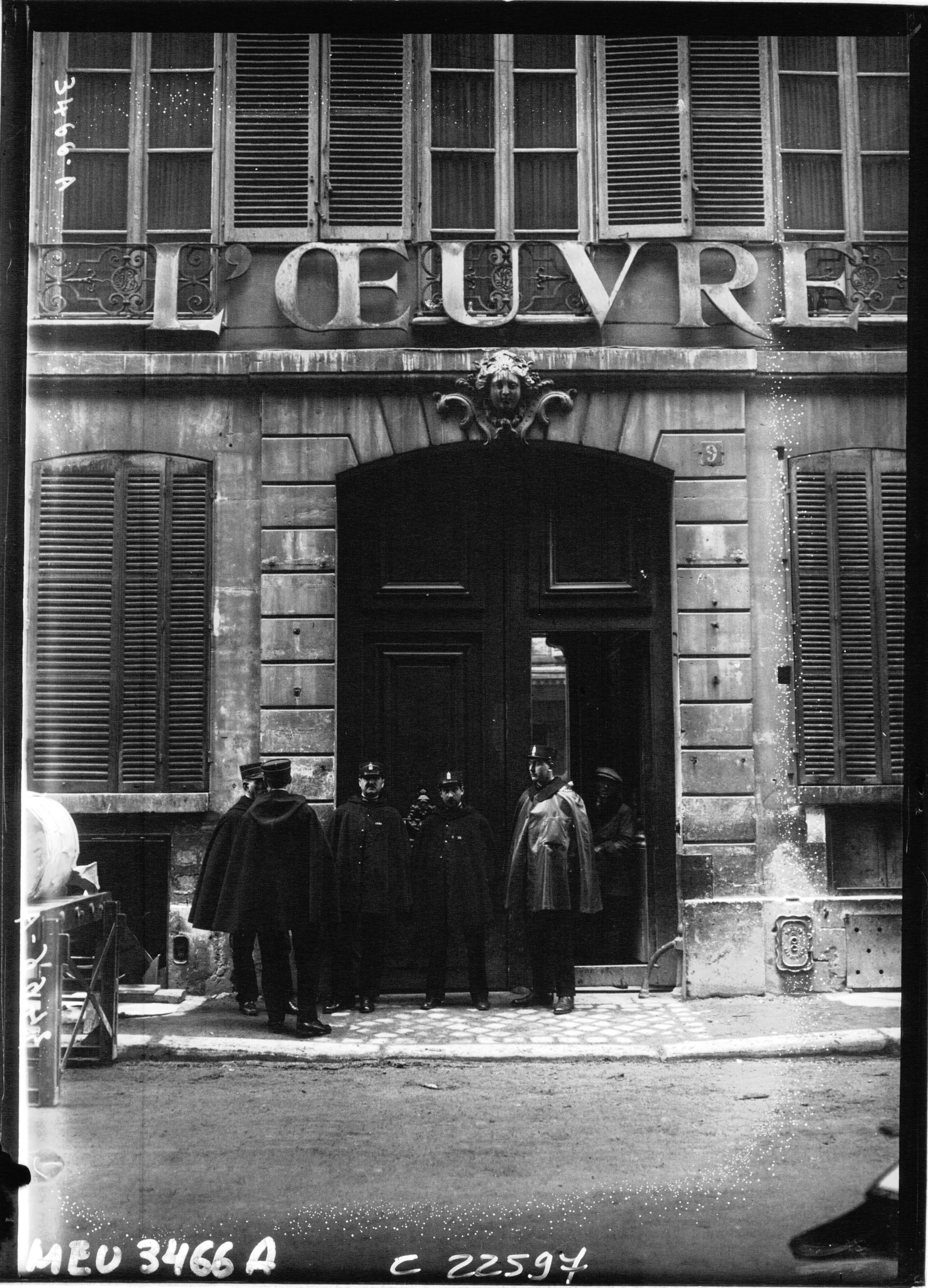 Agents montant la garde devant l'entrée de l'Oeuvre